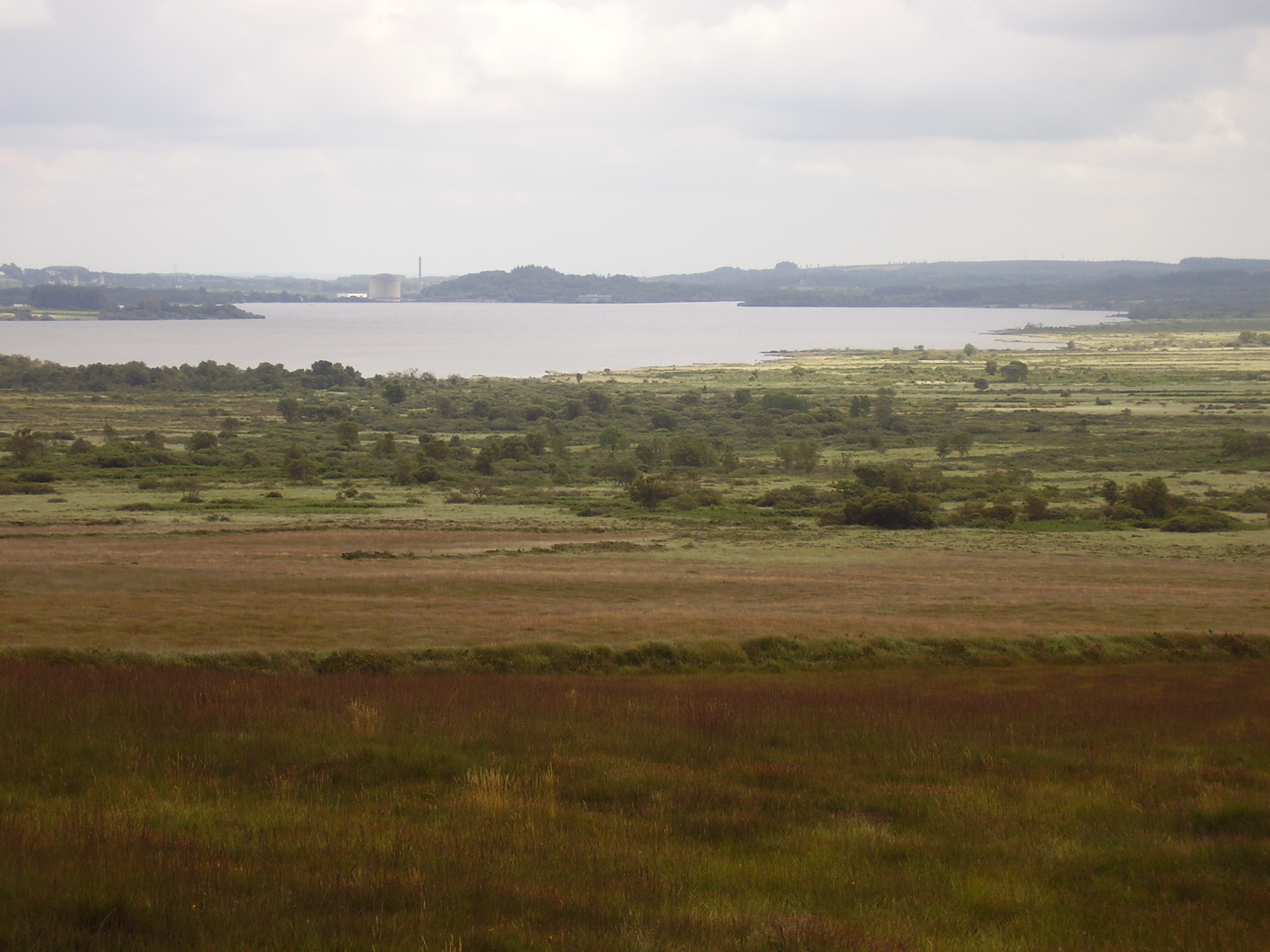 Plounéour-Ménez, Roc'h Trevezel, Bretagne; Frankreich